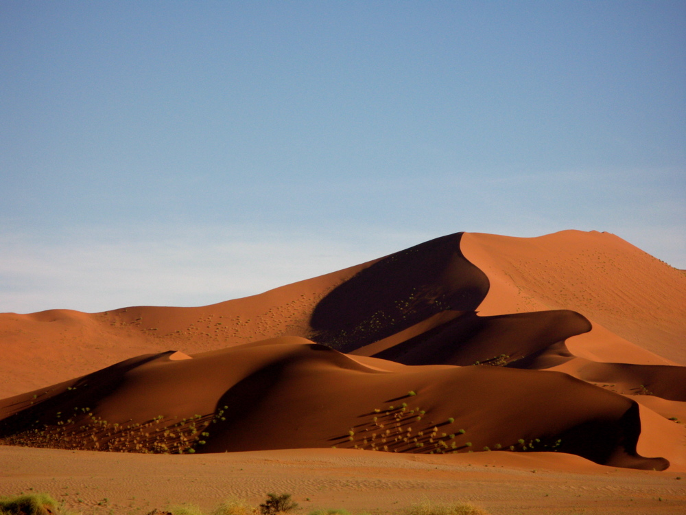 olivier PEYRE, sand dune Sossusvlei Namibia